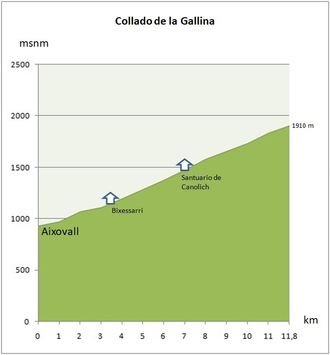 Altimetría del Collado de la Gallina, en Andorra